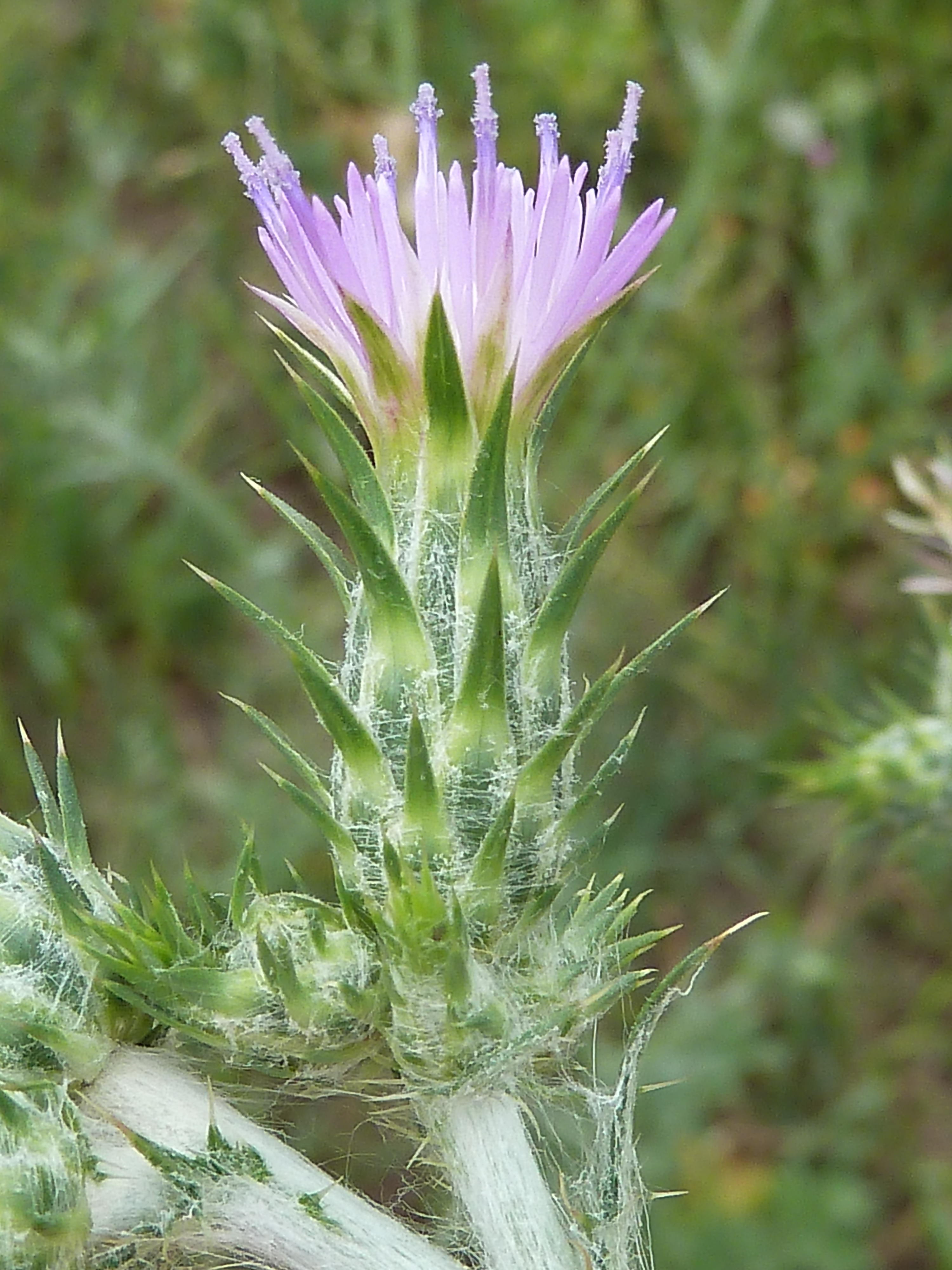 Carduus pycnocephalus (Cardo, cardo borriquero, cardo negro) - Inflorescencia con capítulos en diversos estados de desarrollo; noten los pedúnculos densamente peludos. - Camino de la Azarbe de Patricio, Albatera (Provincia de Alicante, España).